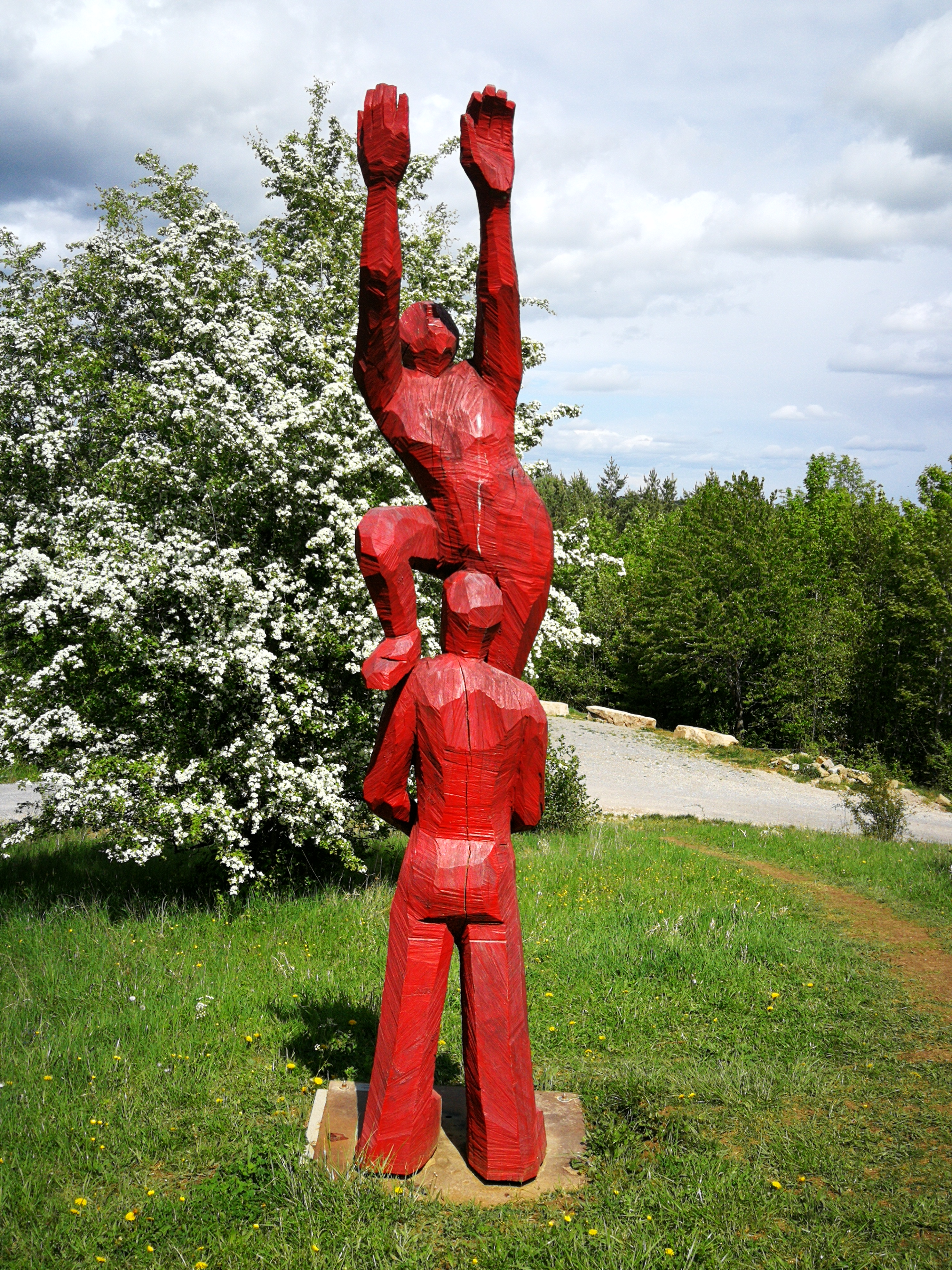 Skulptur: Sternpflücker (Künstler: Josef Lang, Eiche rot lasiert 2015, Standort: Am Fuße des Schönbuchturms bei Herrenberg)